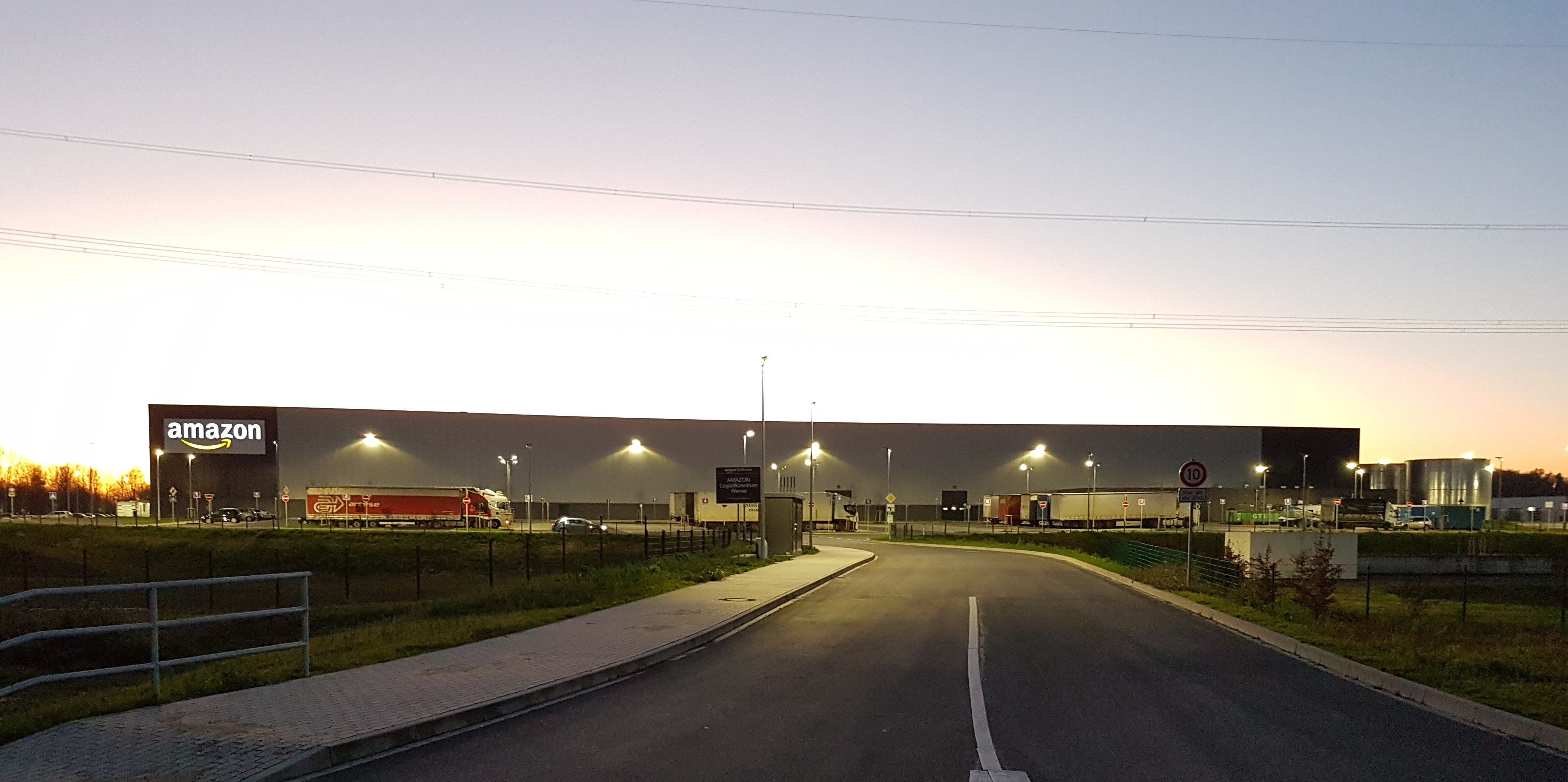 Das 2017 fertiggestellte Amazon-Logistikzentrum in Werne, Nordrheinwestfalen mit 1.800 Mitarbeitern auf 100.000 m² Fläche